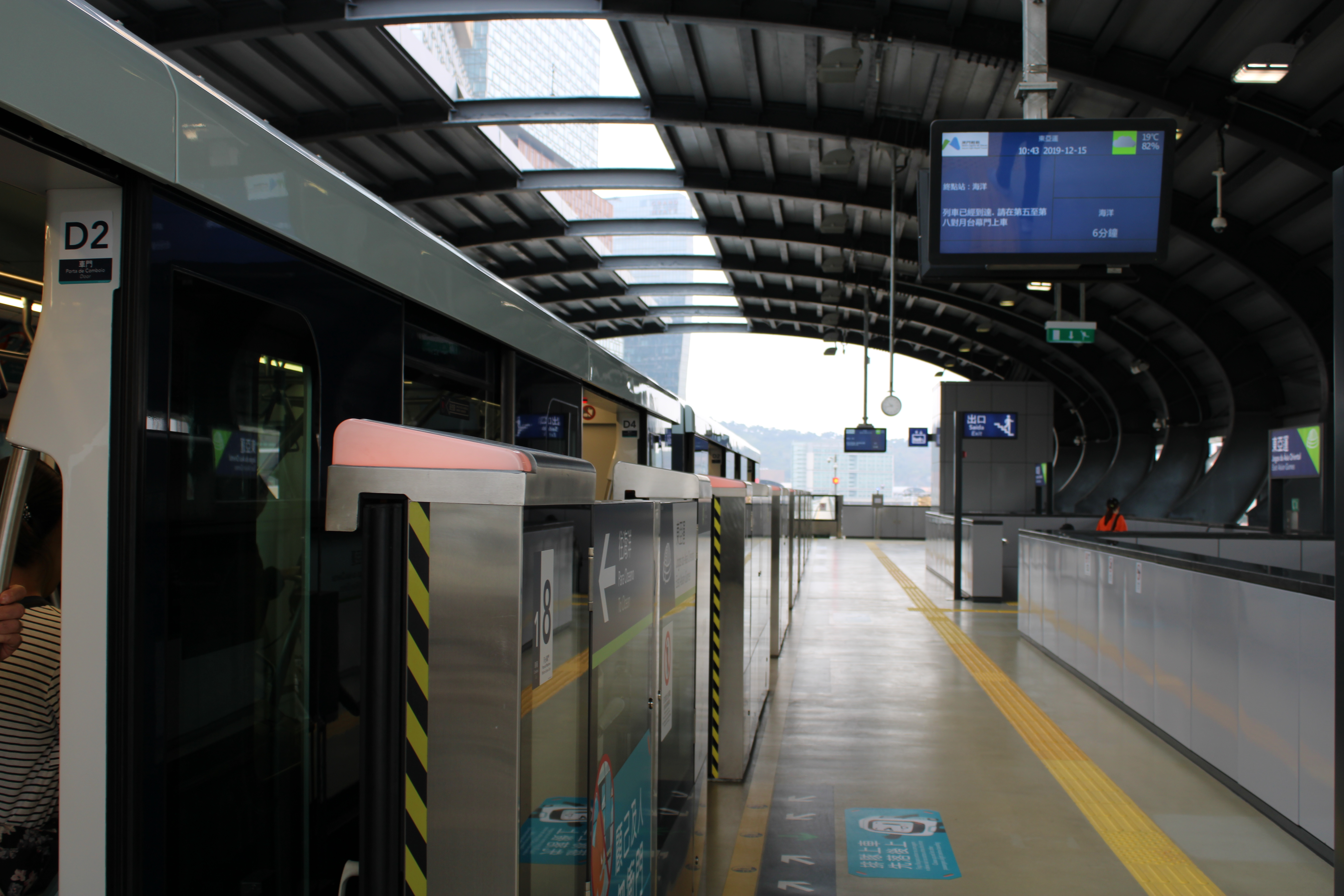 2019年12月的澳門輕軌氹仔線東亞運站月臺。